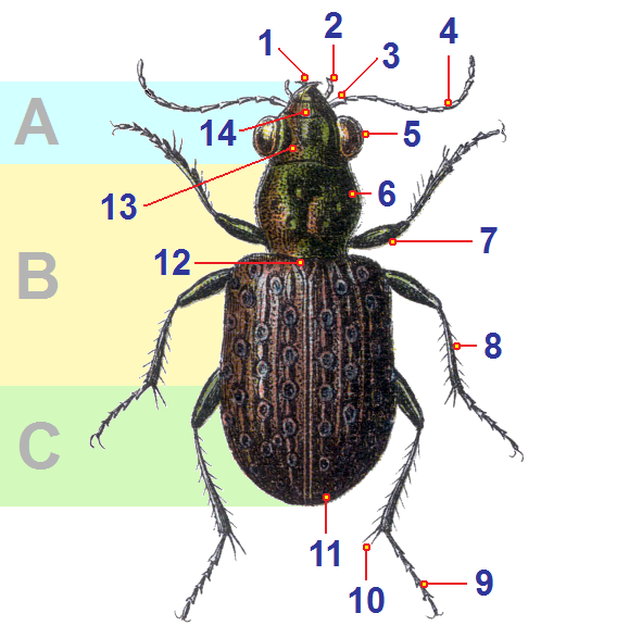 cutted out of image Reitter Notiophilus u.a..jpg and tagged bodyparts